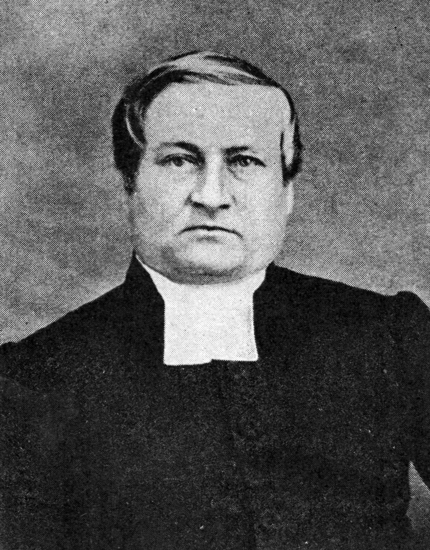 Gabriel Mauritz Waenerberg.